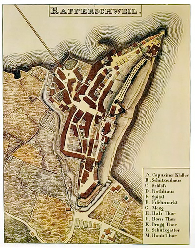 Rapperswil : Grundriss der Stadt Rapperswil, 1831, Kupferstich.